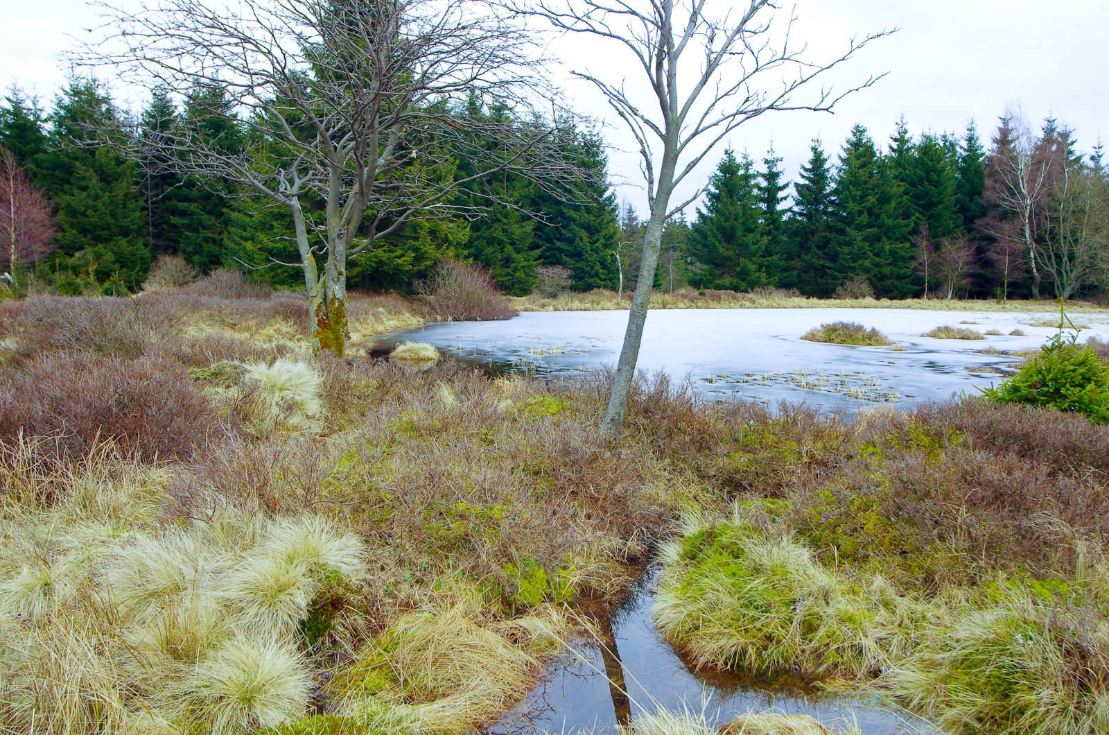 Přírodní rezervace Rašeliniště u myslivny, Slavkovský les, okres Sokolov